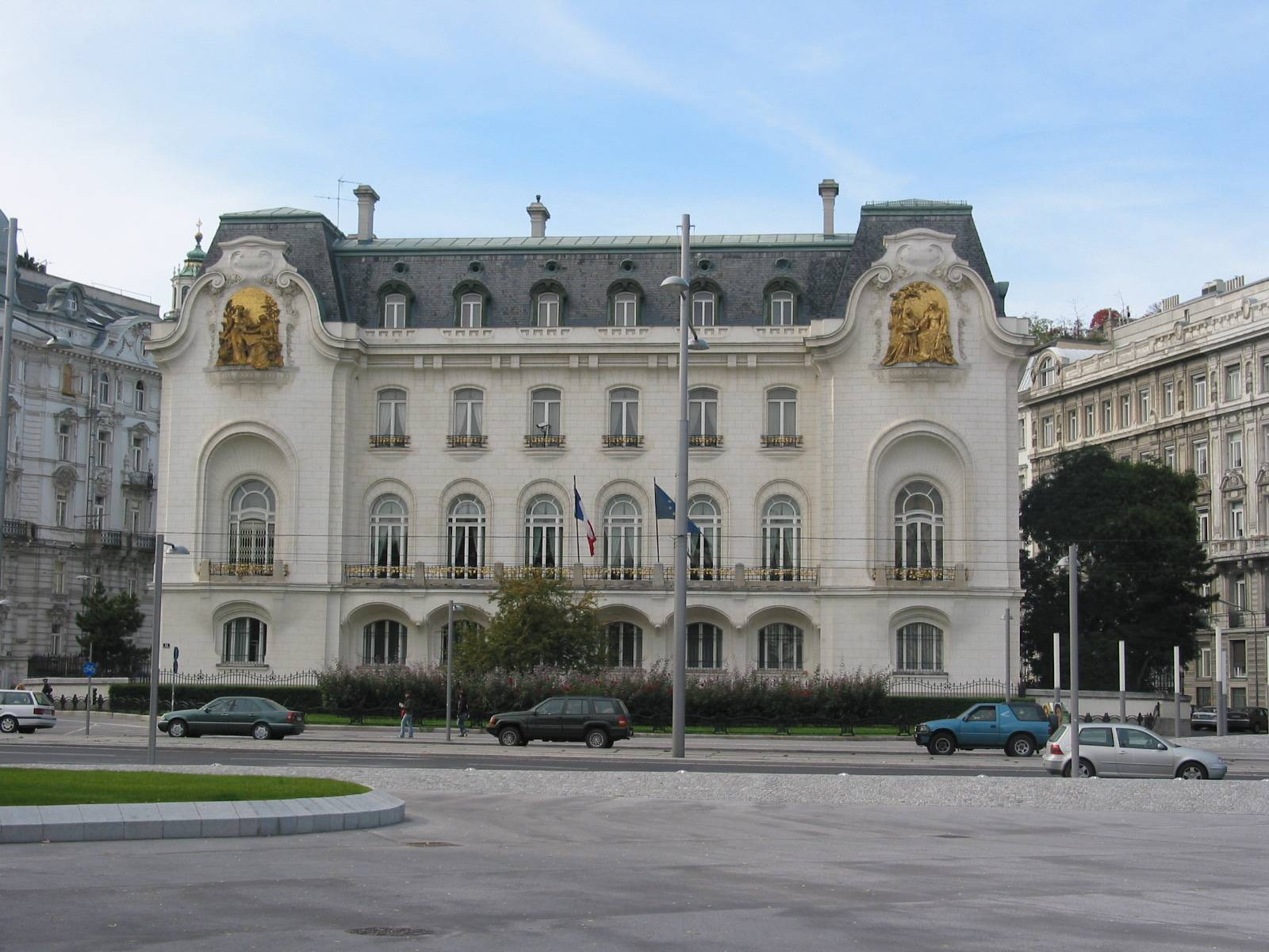 Französische Botschaft in Wien (French embassy in Vienna), Vienna IV, 2005-10-08 selfmade photo